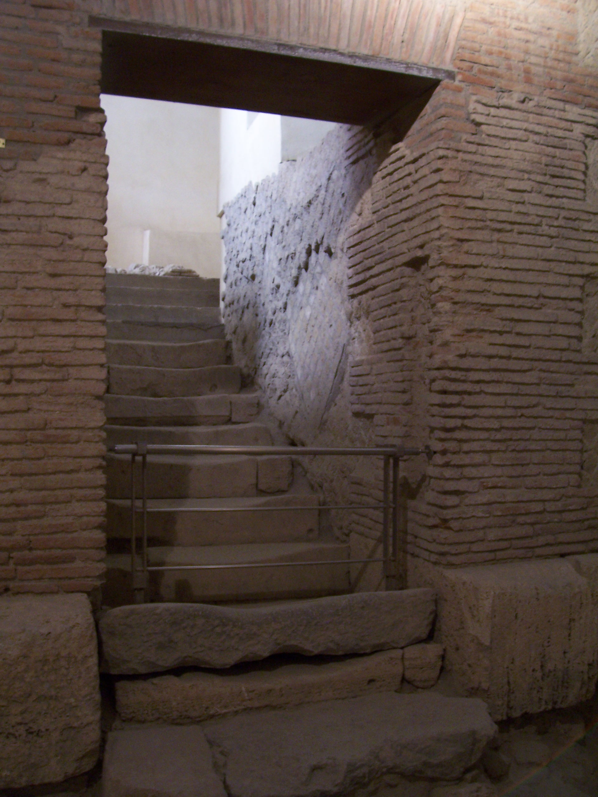 Termas romanas de Pozzuoli.